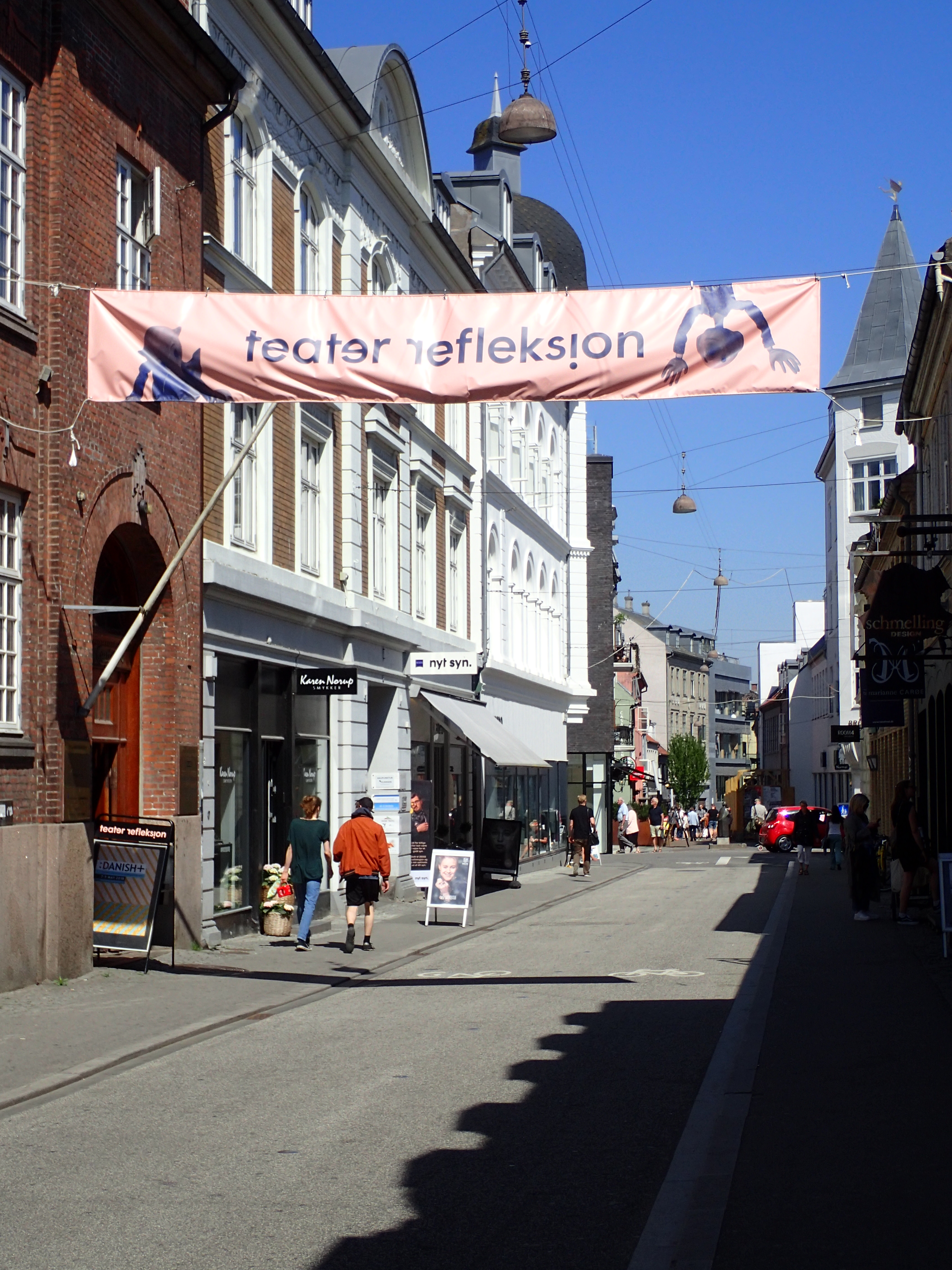 Frederiksgade i Aarhus.